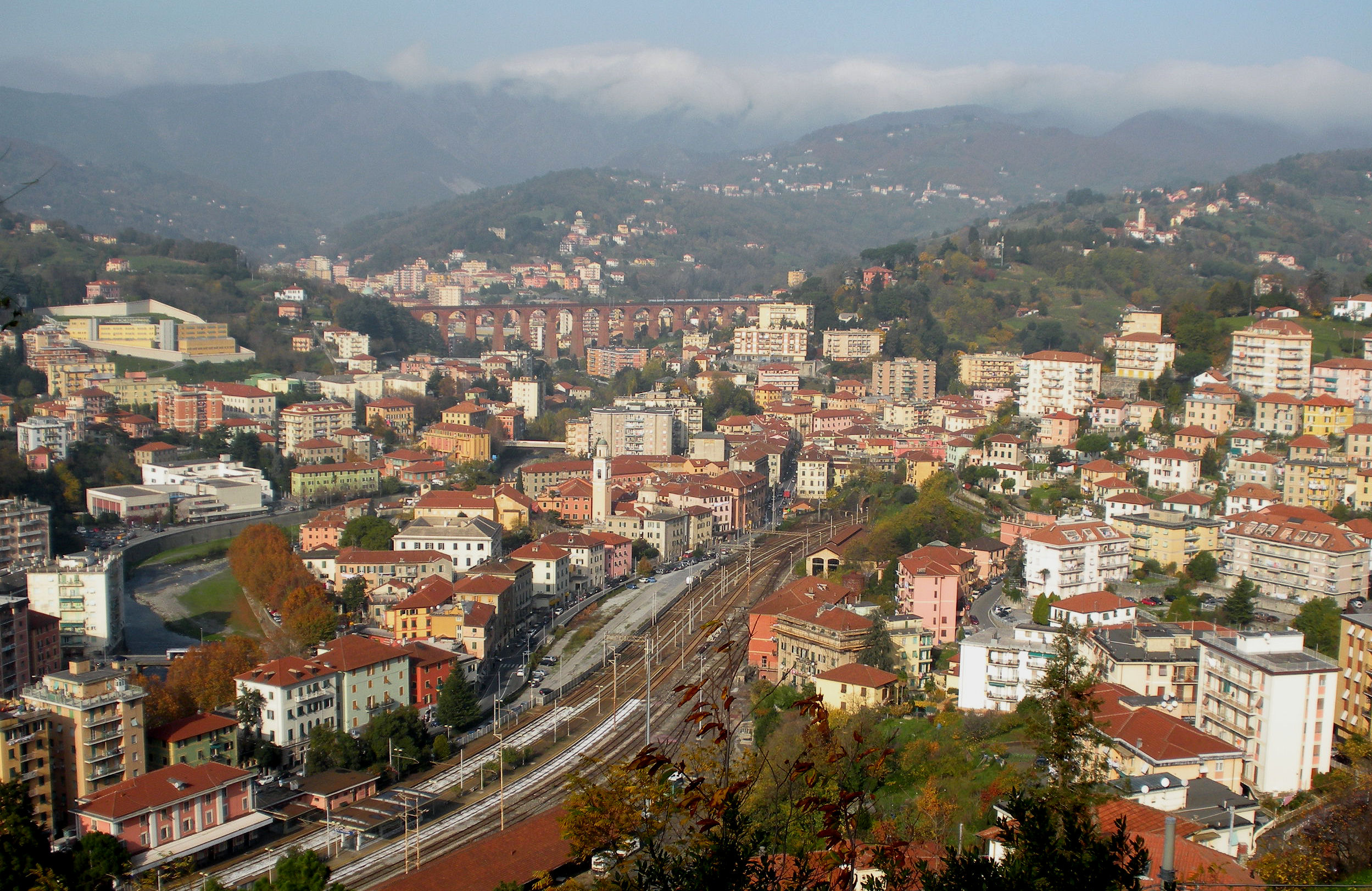 Veduta panoramica di Pontedecimo (Genova)